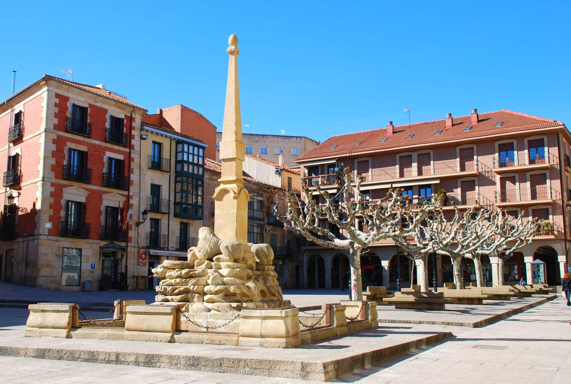 Plaza del Ayuntamiento en Soria (España)